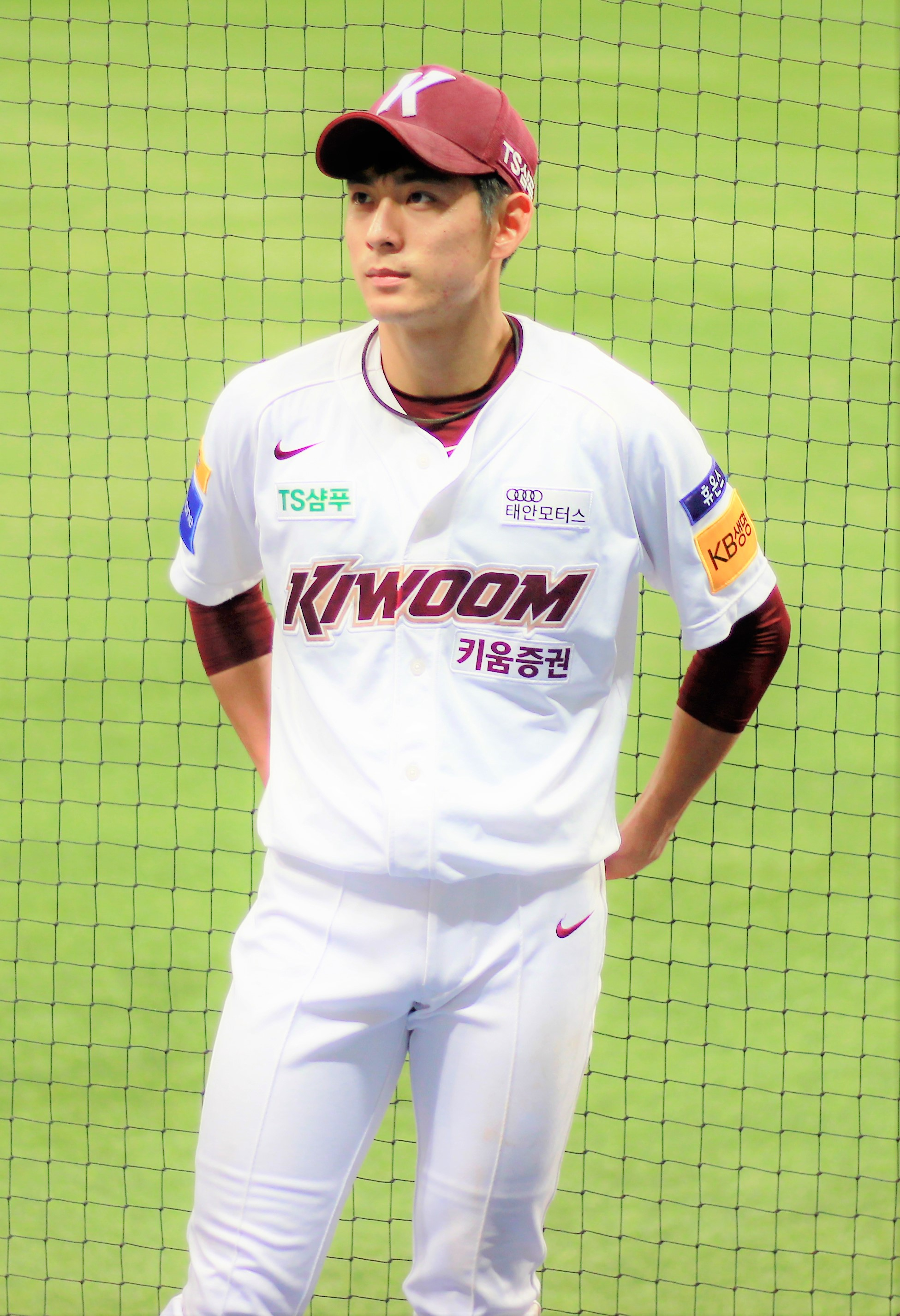 키움 히어로즈의 이정후 외야수